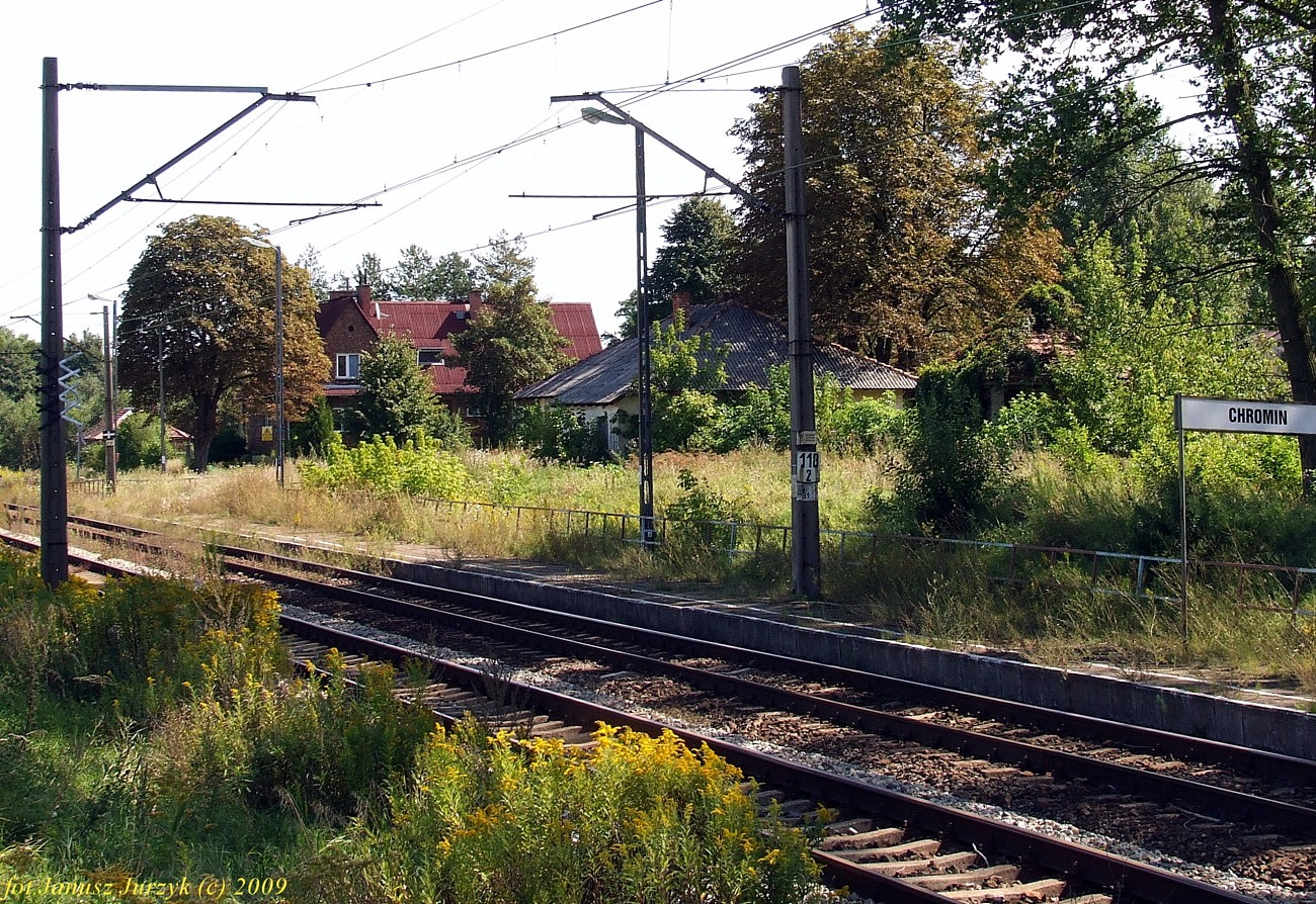 Przystanek kolejowy Chromin.